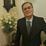 Jozef Zamputti